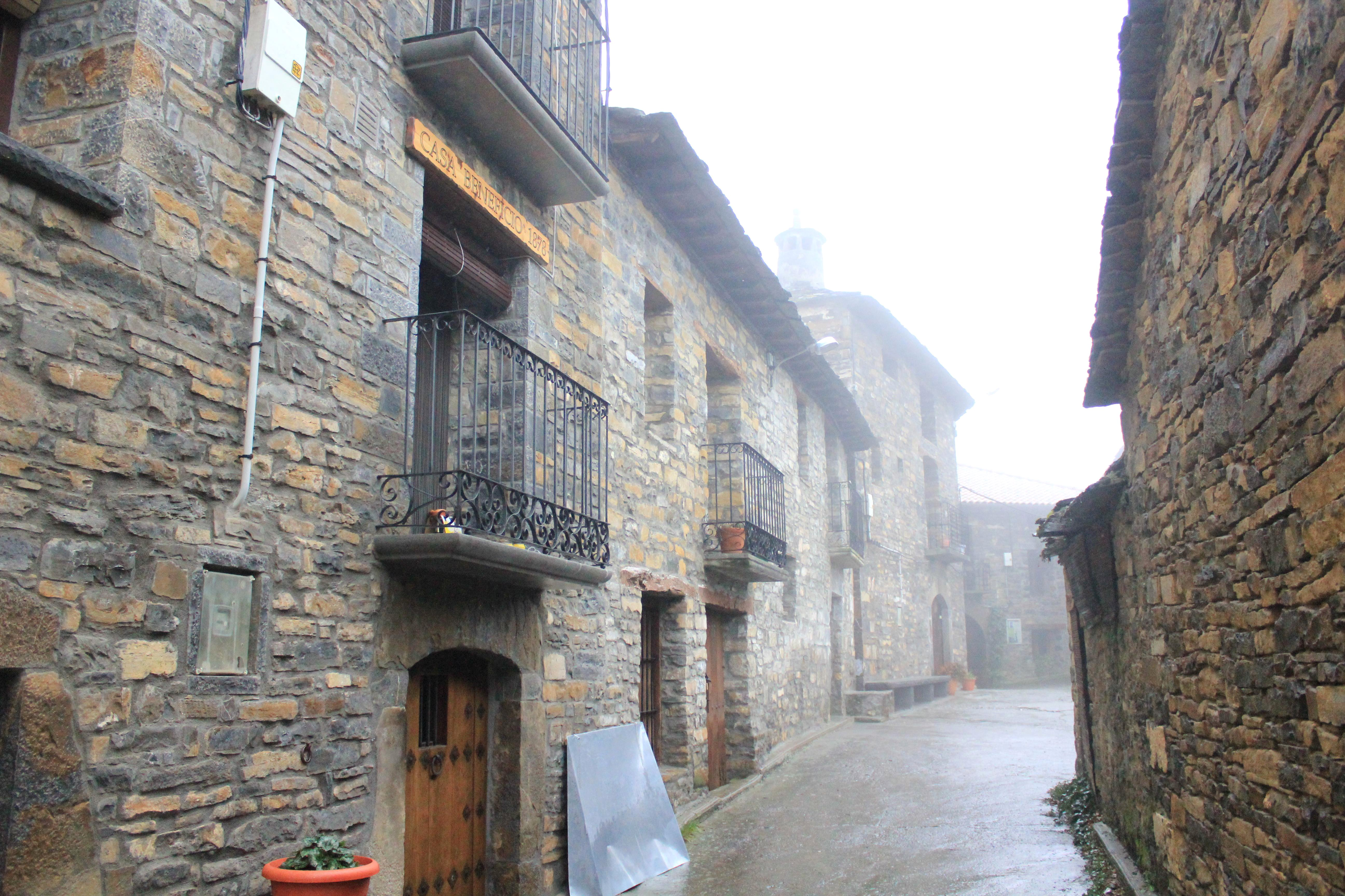 Aragonés: A sola carrera de Charo (A Fueva).